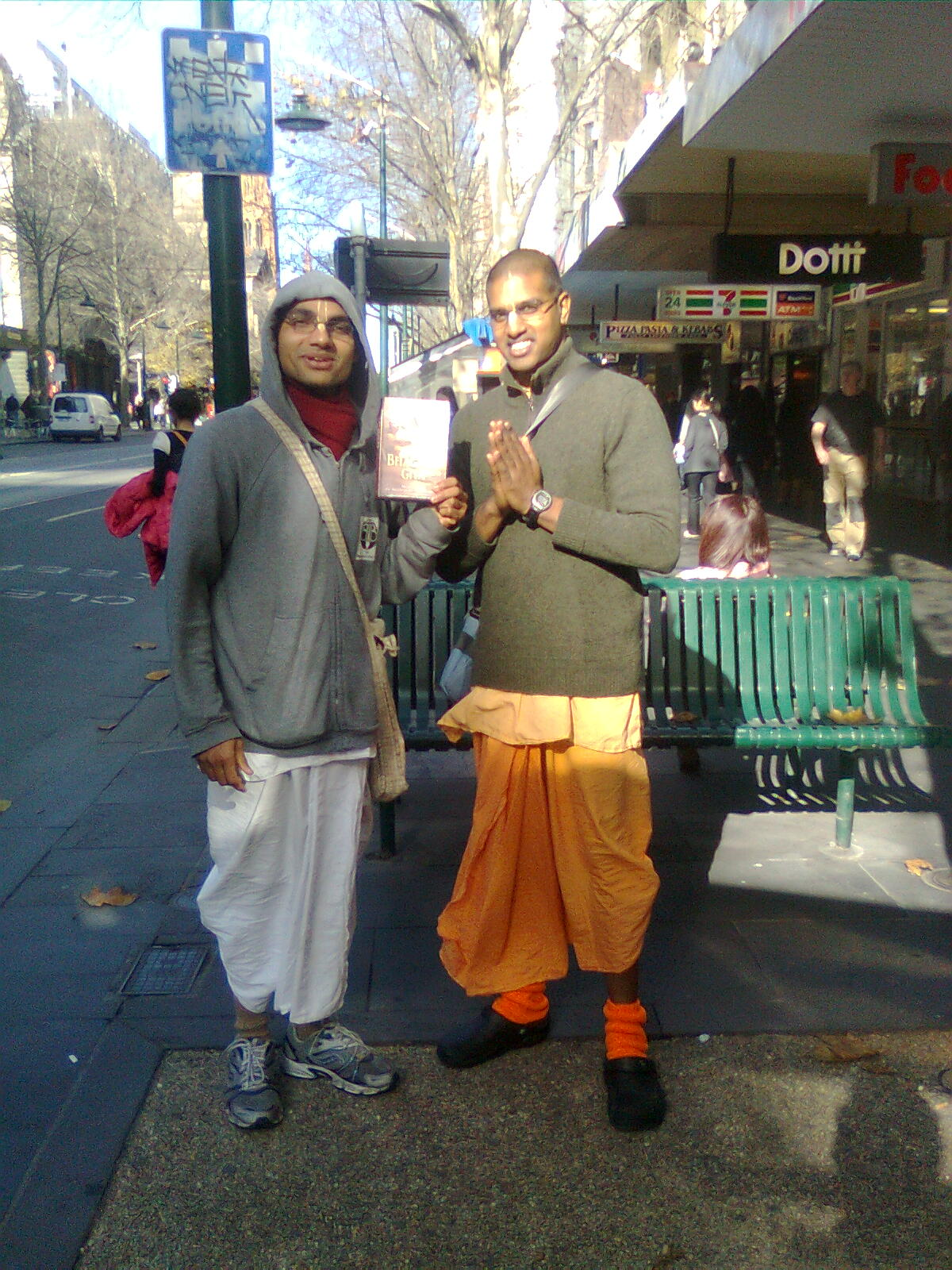 इस्कॉनचे मेलबर्न येथील स्वयंसेवक